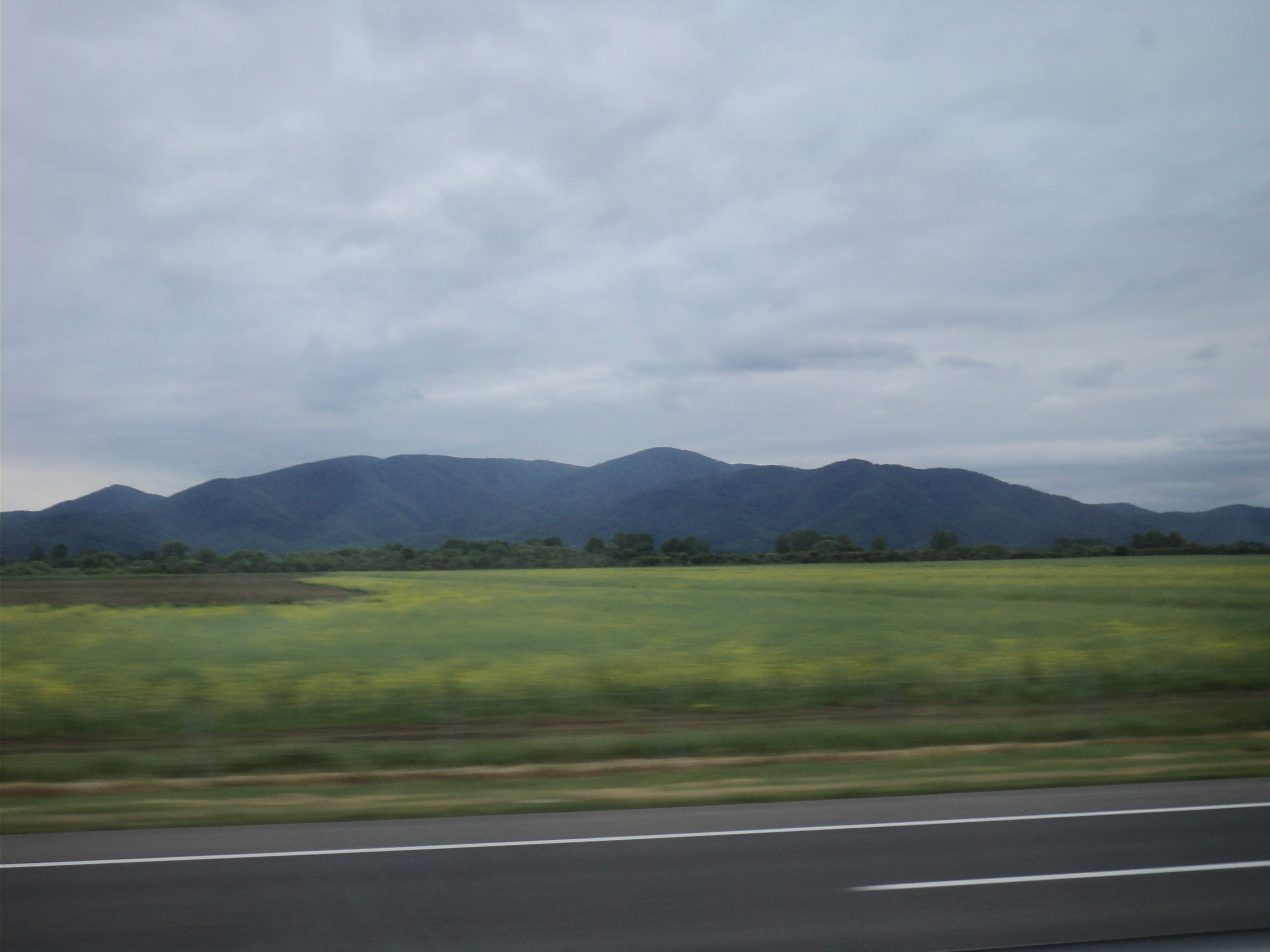 Planina Motajica, pogled sa severa. Self-made. Maj 2011. Author: User: Plamen